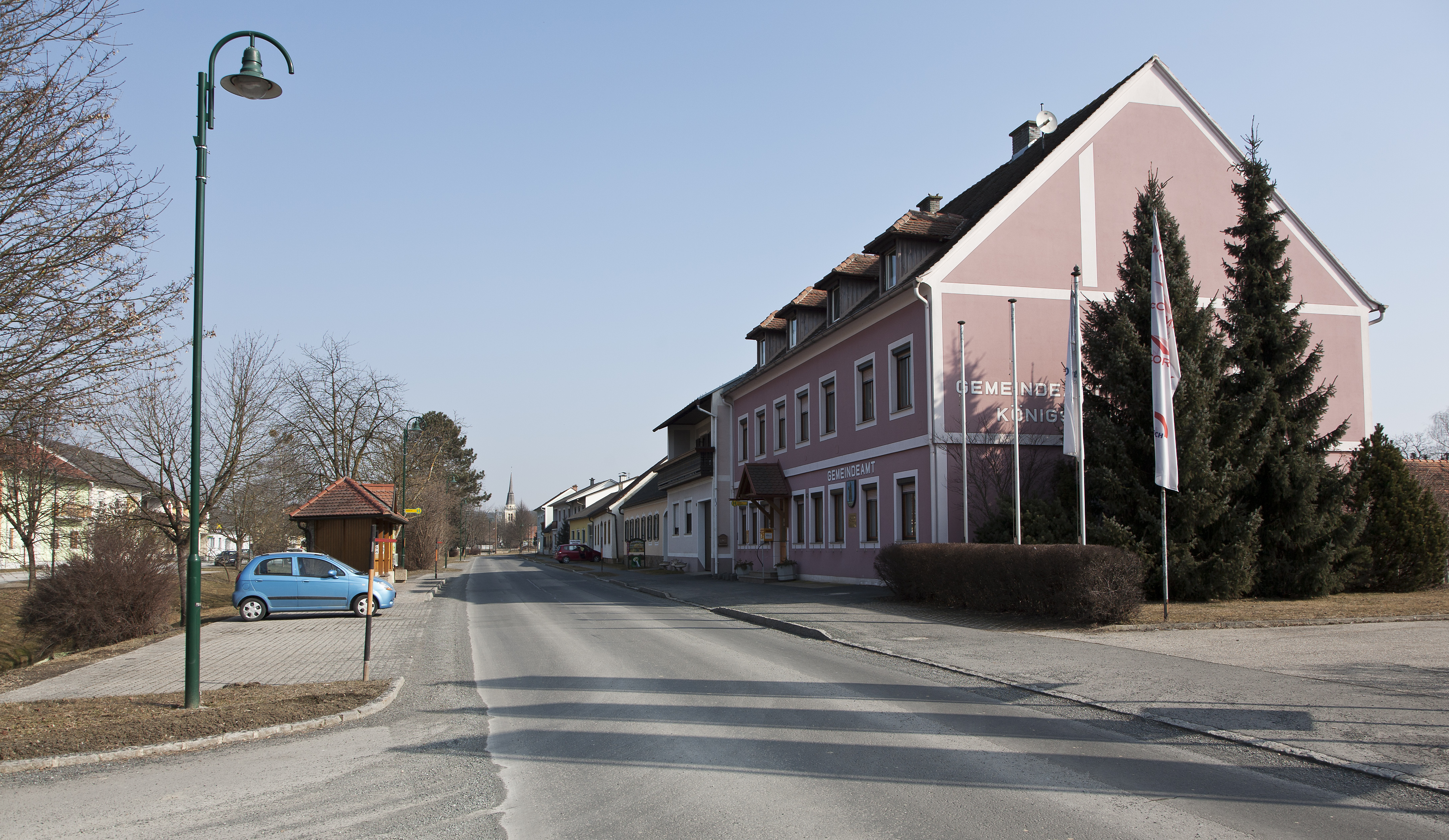 Königsdorf im Burgenland, Gemeindeamt